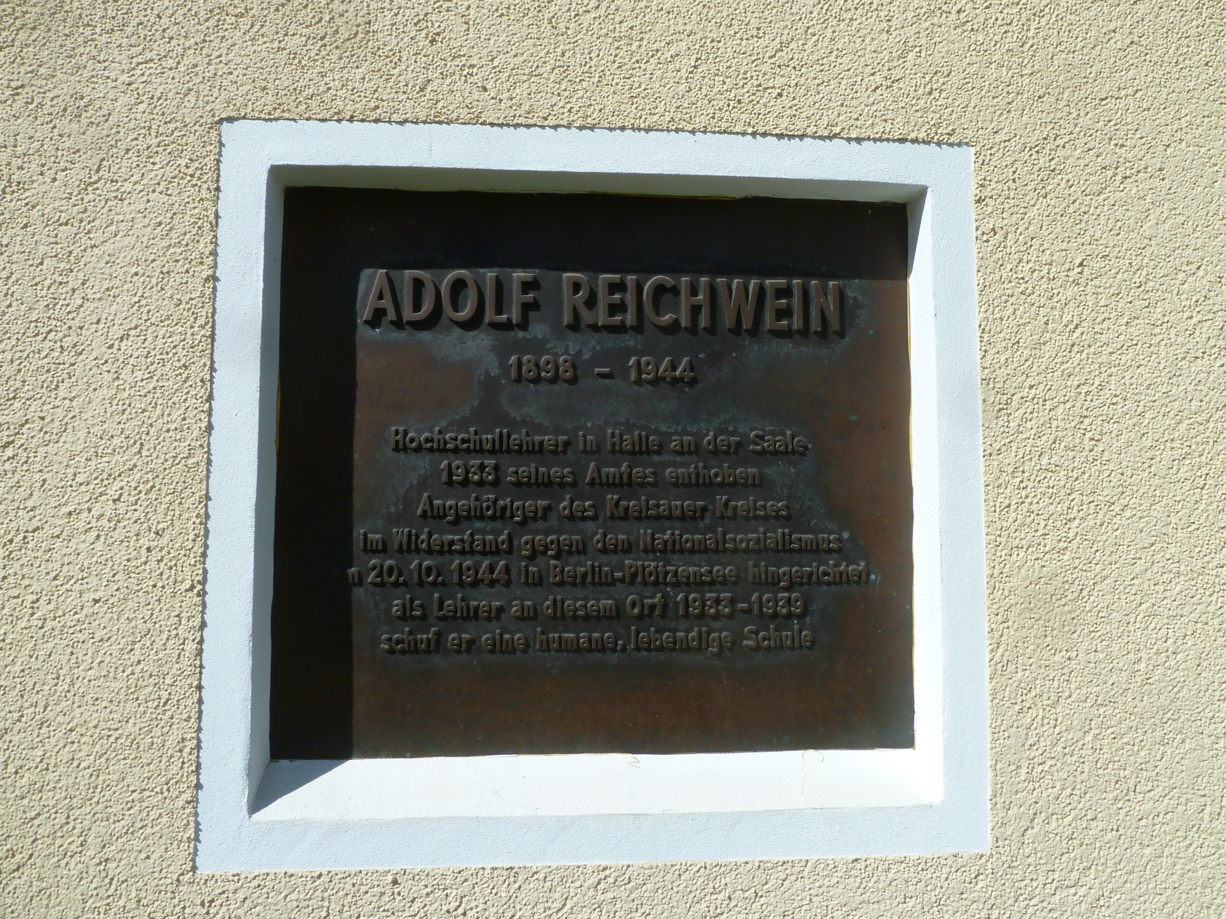 Tiefensee, Stadt Werneuchen, denkmalgeschützte Gedenktafel für den hier lebenden Pädagogen, SPD-Politiker und NS-Opfer Adolf Reichwein